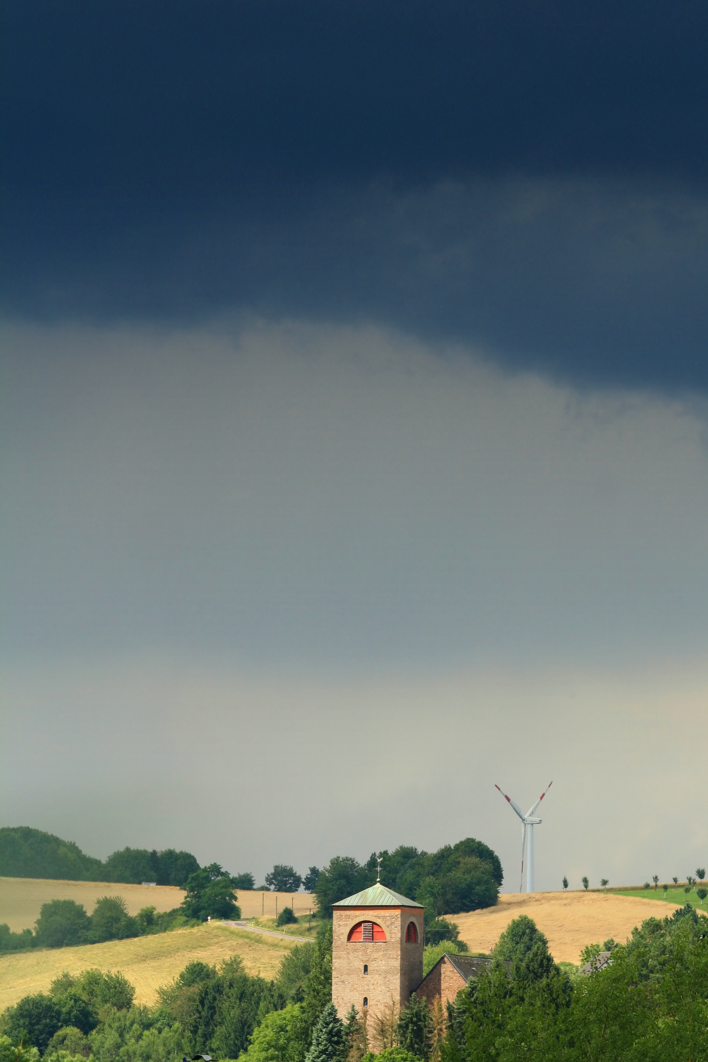 Katholische Pfarrkirche St. Wendalinus Dirmingen vom Hundsberg aus gesehen.